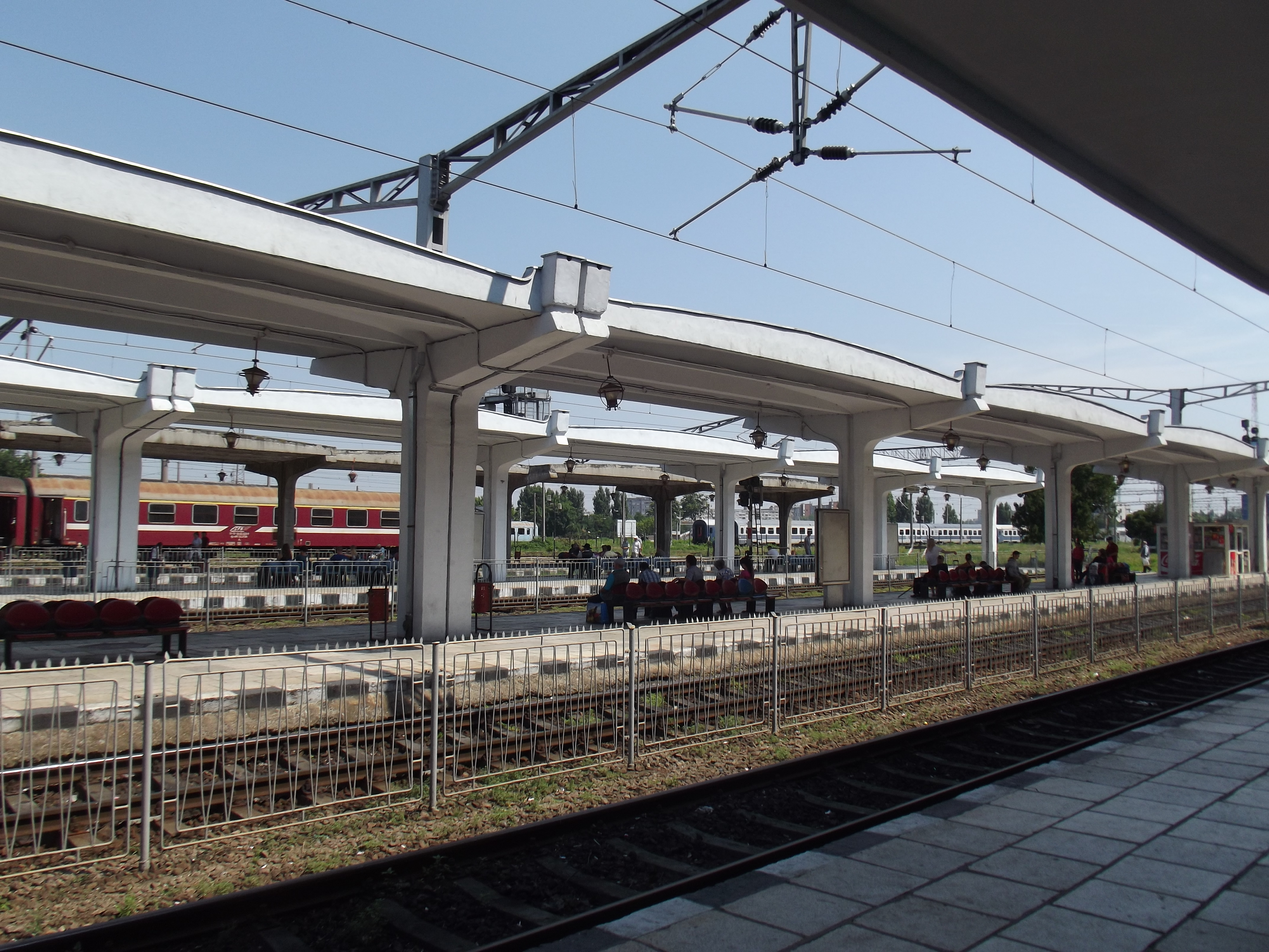 Platformen in Timişoara Nord